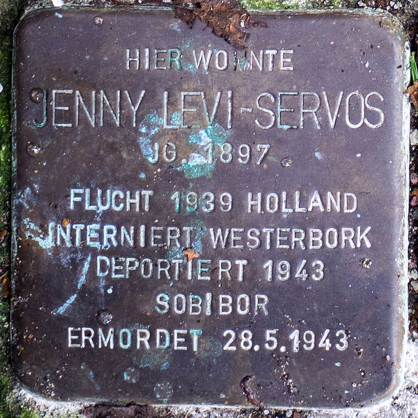 Stolperstein für Jenny Levi-Servos (Willich)